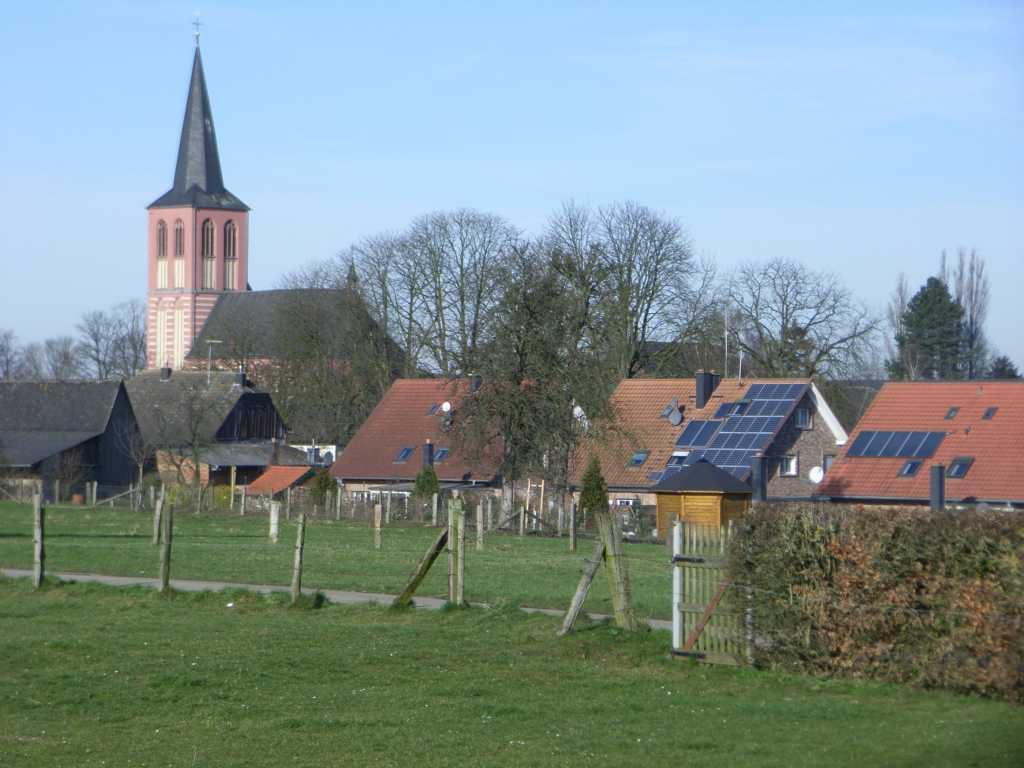 Titz-Hasselsweiler